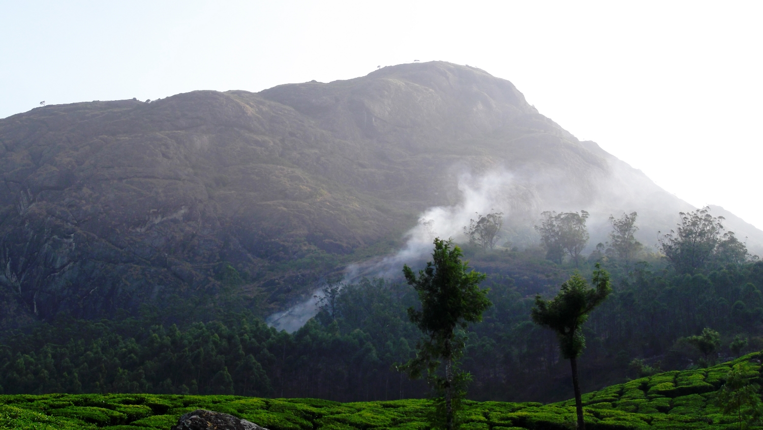 Devikulam Green Carpet